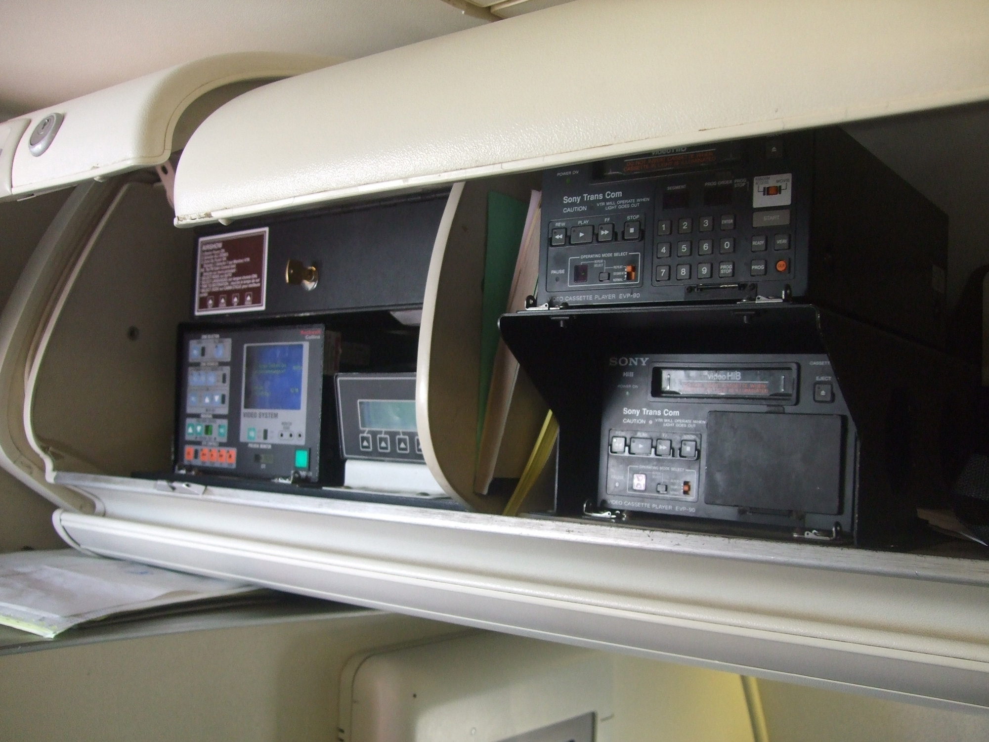 Eine Sony Trans Com EVP-90 Hi8 Video-Anlage in einem Flugzeug der tunisair